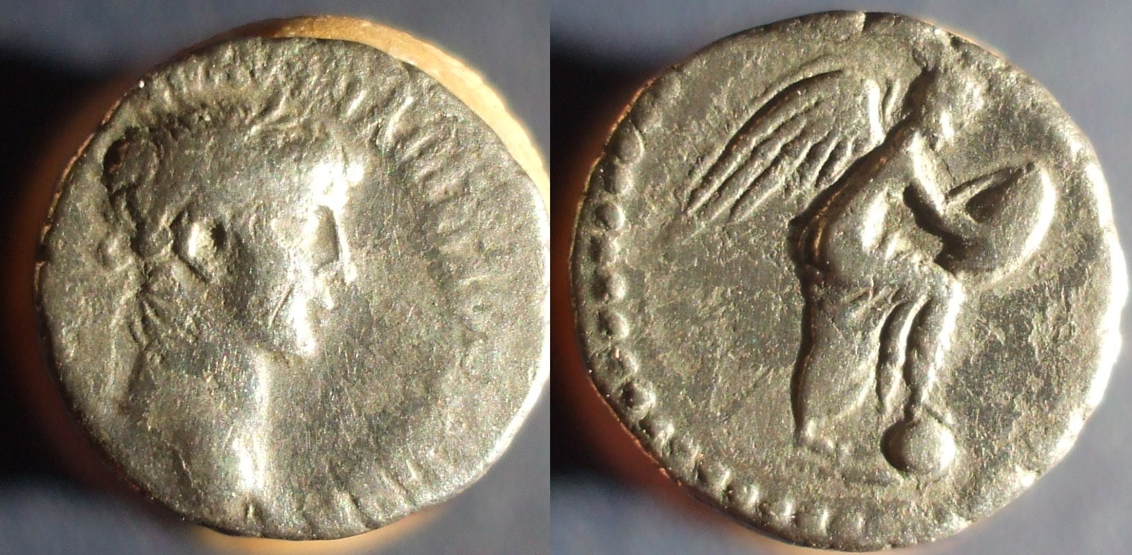 hémidrachme en argent de Néron figurant au revers Nikè la victoire écrivant sur un bouclier